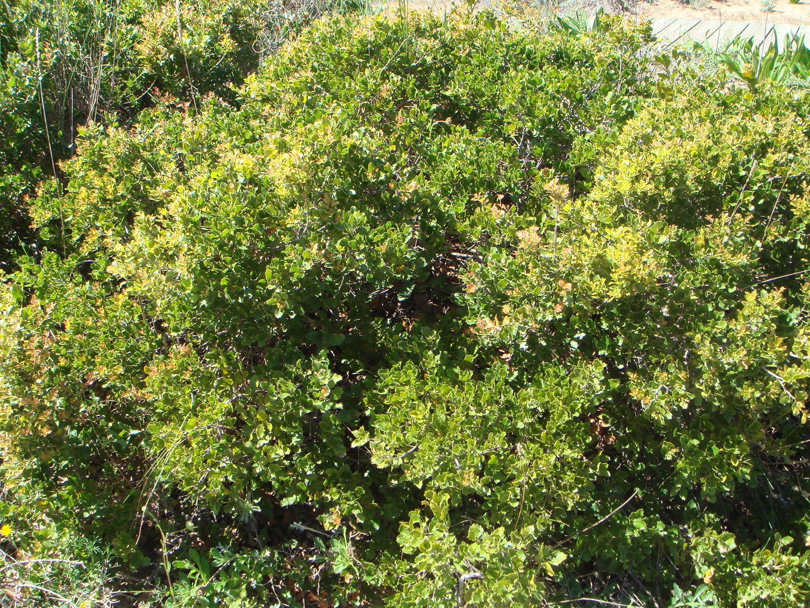 Quercus coccifera, Costa de Cádiz, España